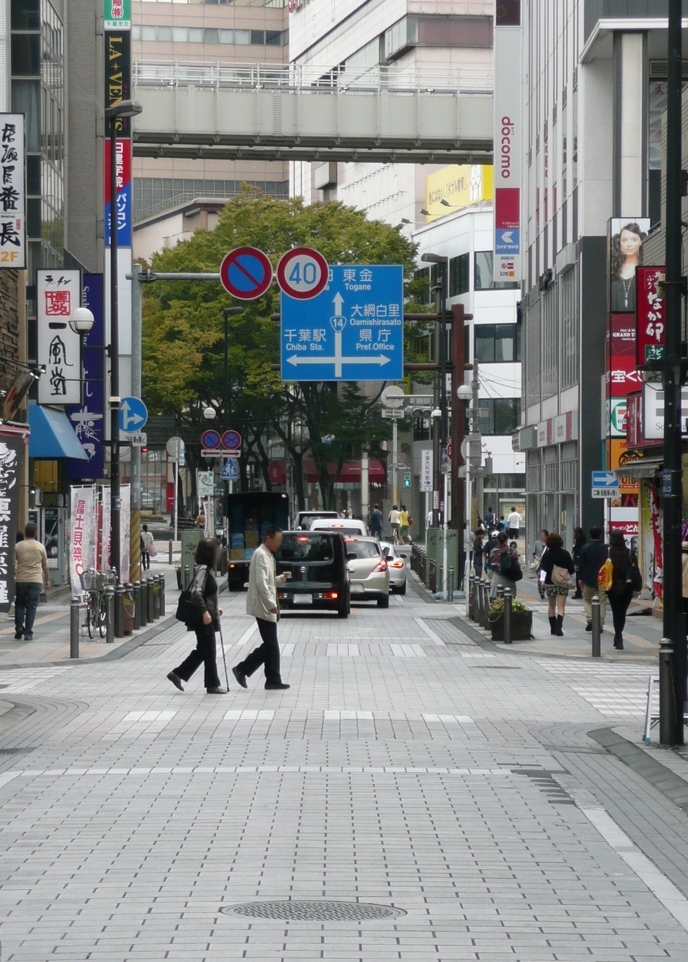 国道14号千葉市中央区富士見二丁目付近の一方通行区間